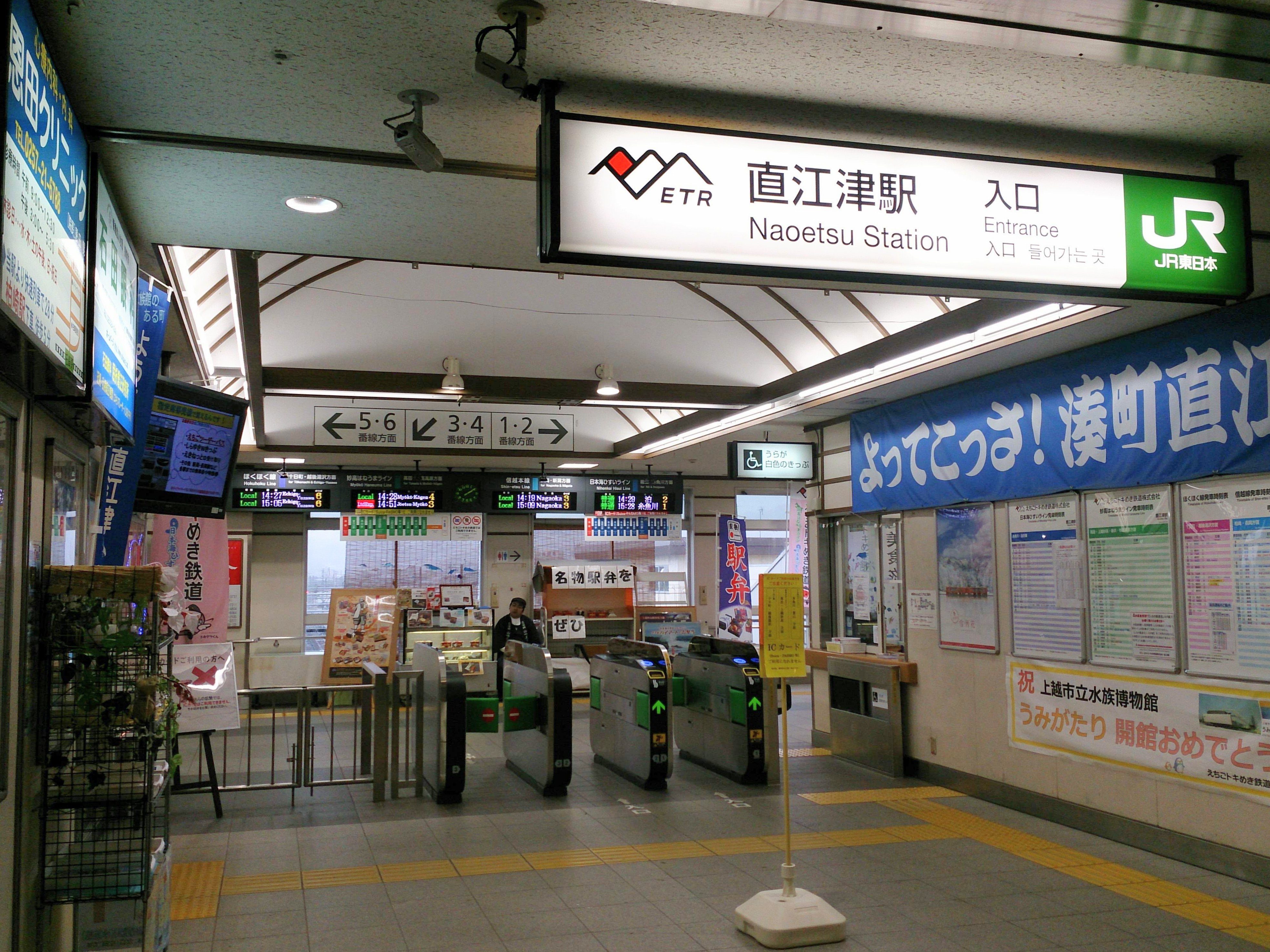 直江津駅の改札口